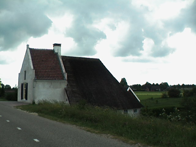 Dijkhuis in de buurt van Welsum